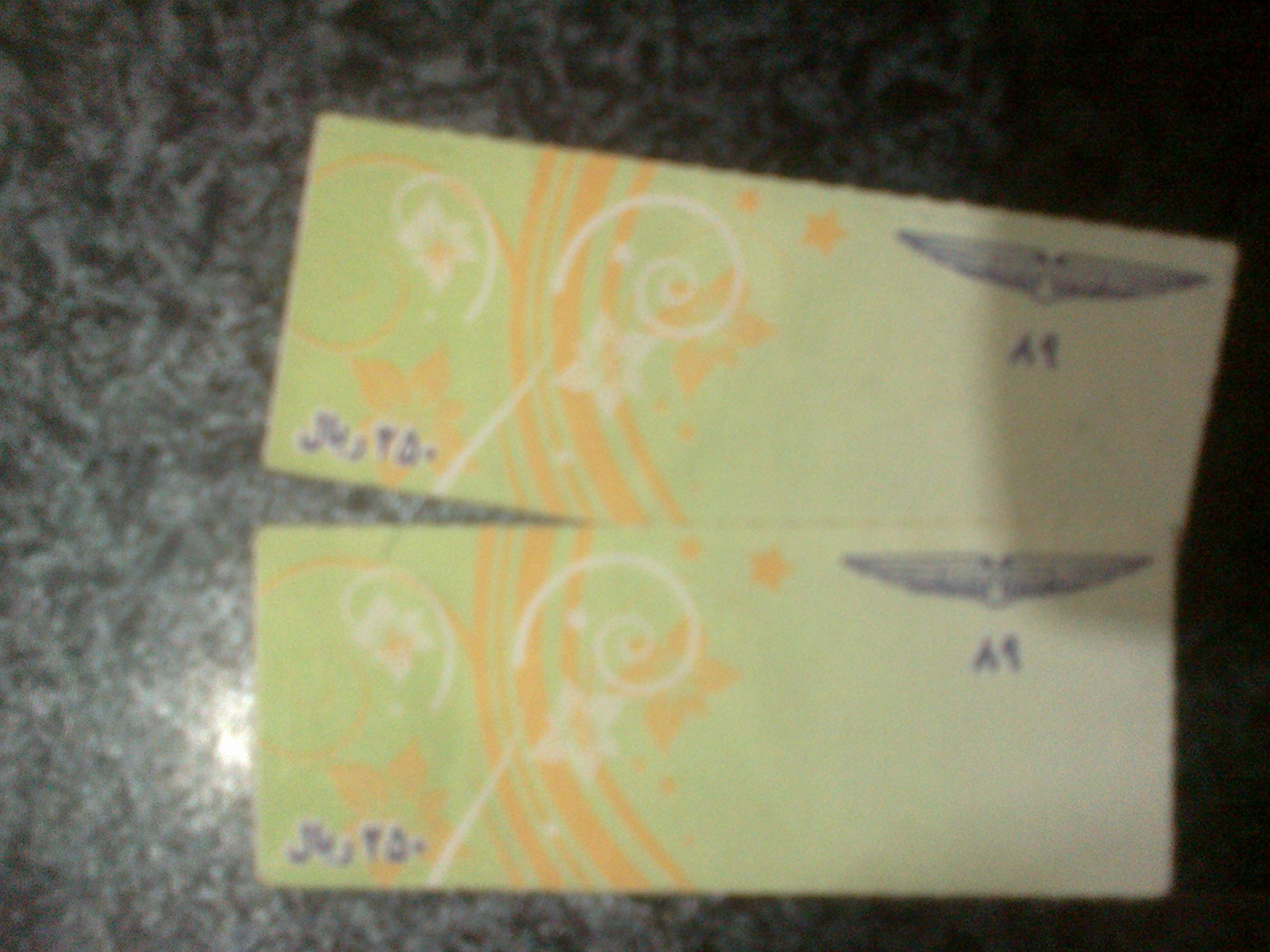 دو عدد بلیط 25 تومانی اتوبوس تهران از 1389 از نوستالژی‌های جدید